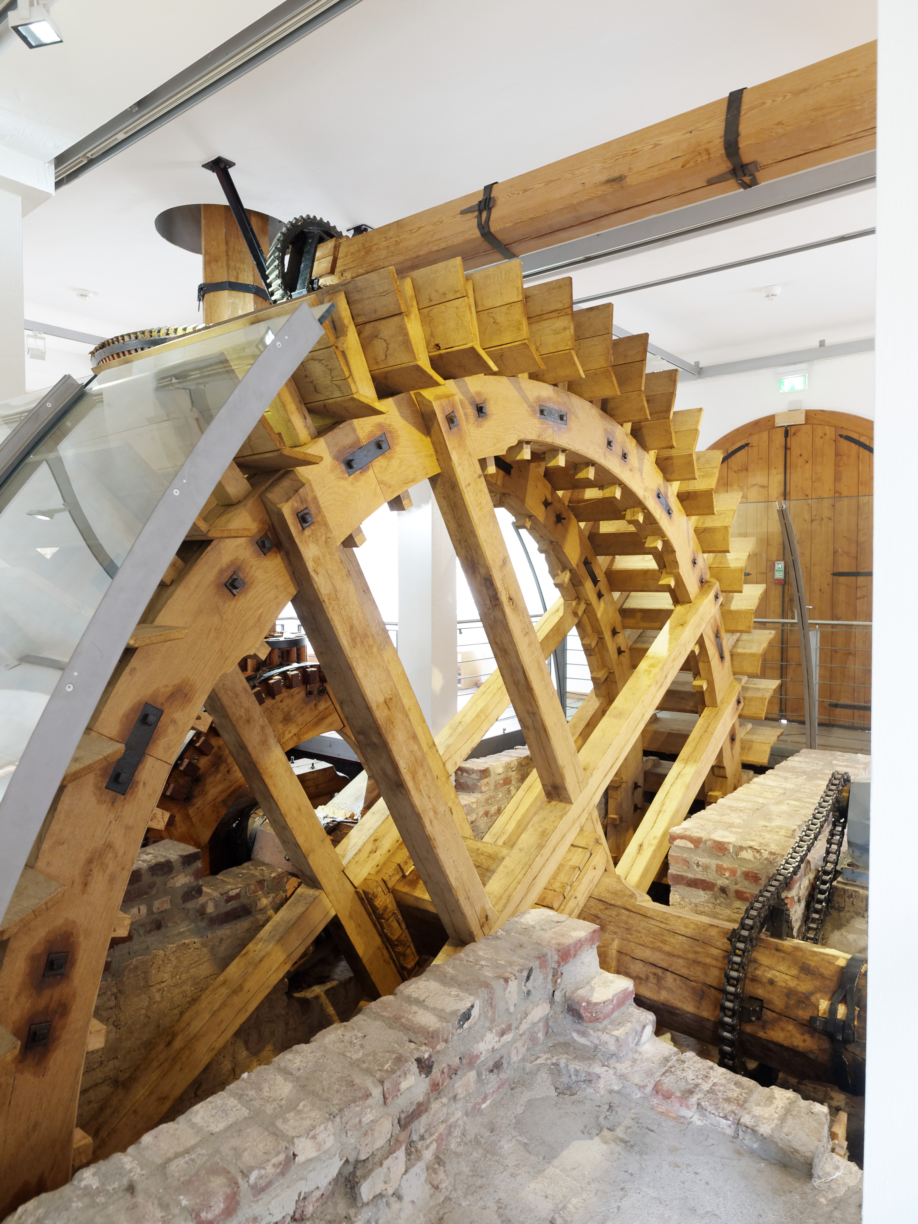 Wasserrad als Antriebsrad für die verschiedenen Wellen und Transmissionen im Textilmuseum Cromford in Ratingen